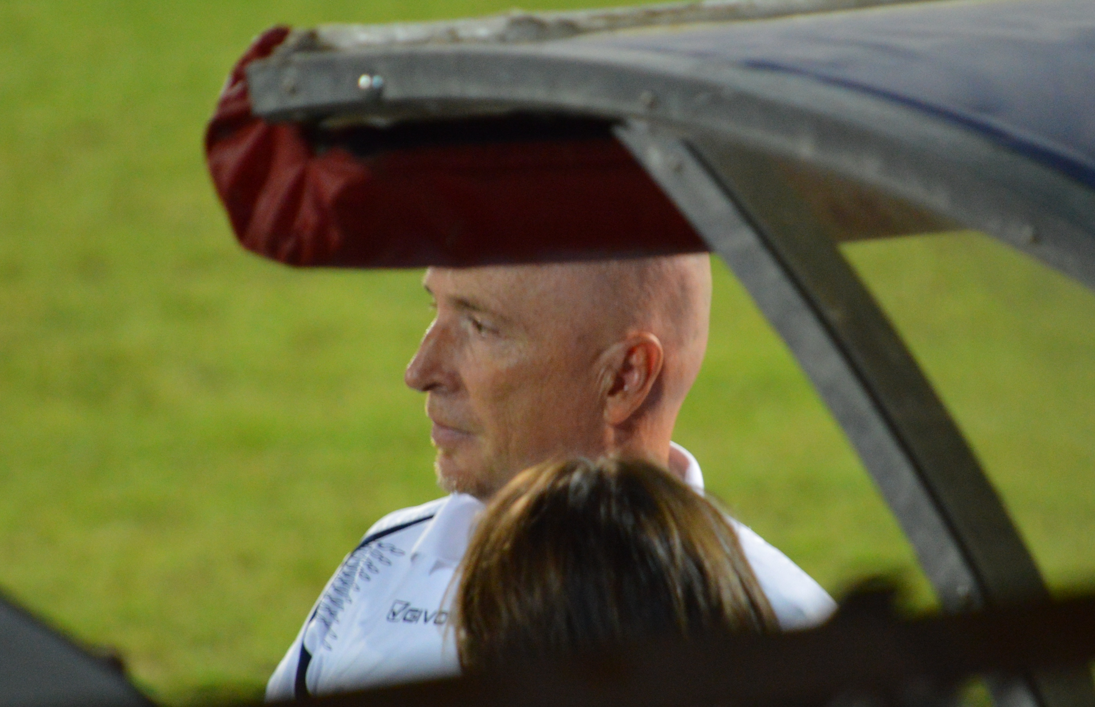 Rolando Maran, allenatore